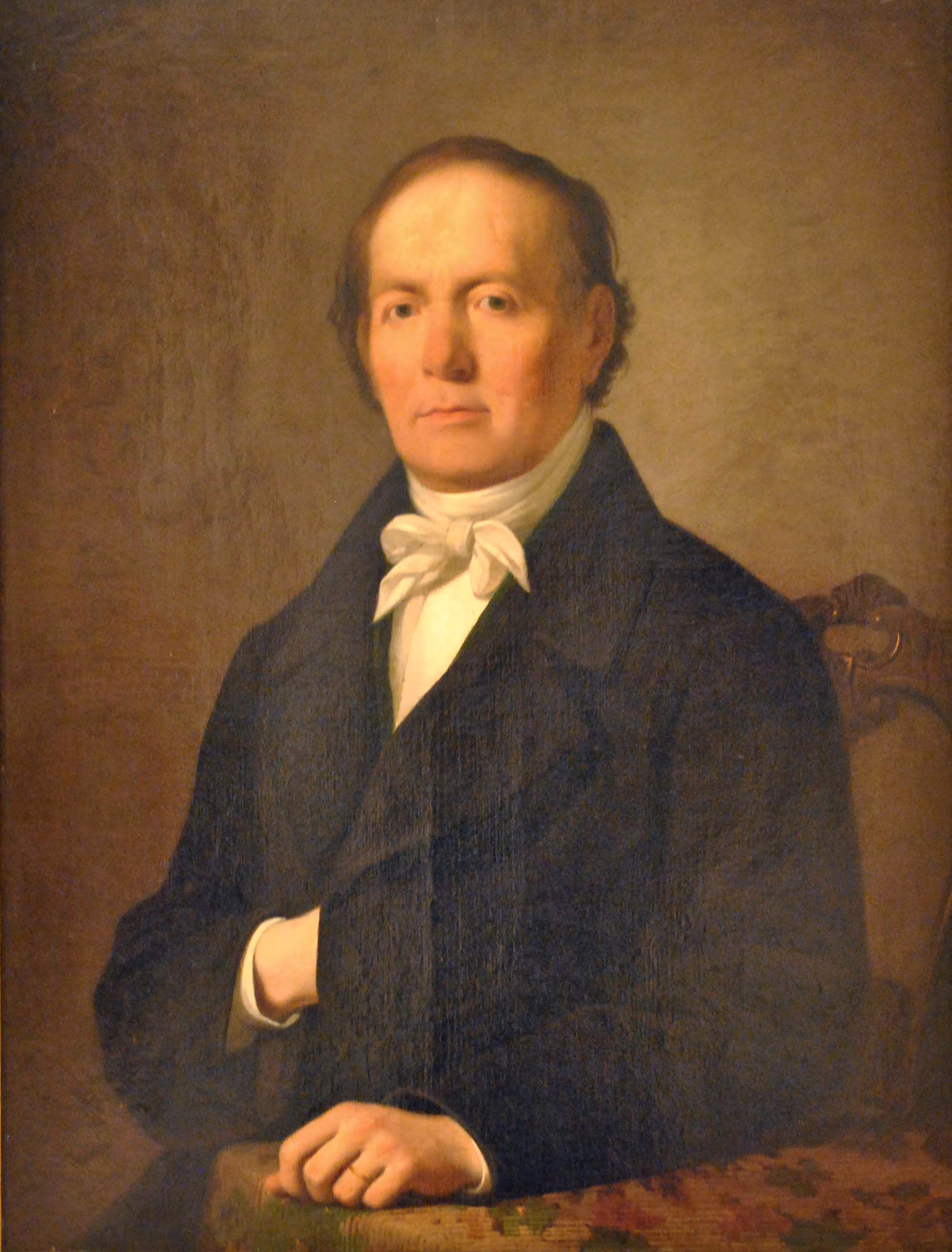 Luigi Asioli (1817-1877) Ritratto di Giuseppe Asioli. Galleria Asioli, Museo del Correggio.